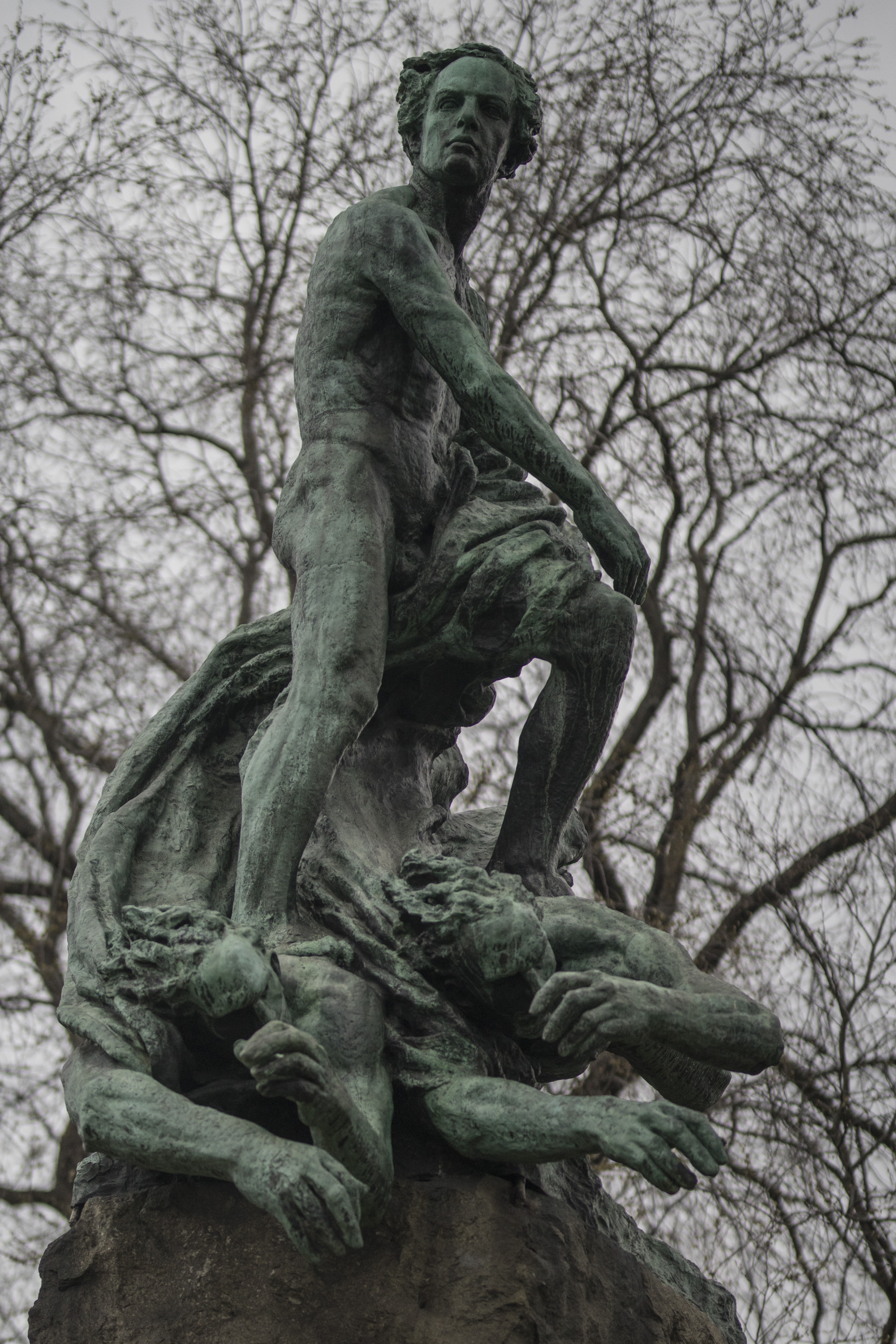 Abel-monumentet i Slottsparken i Oslo